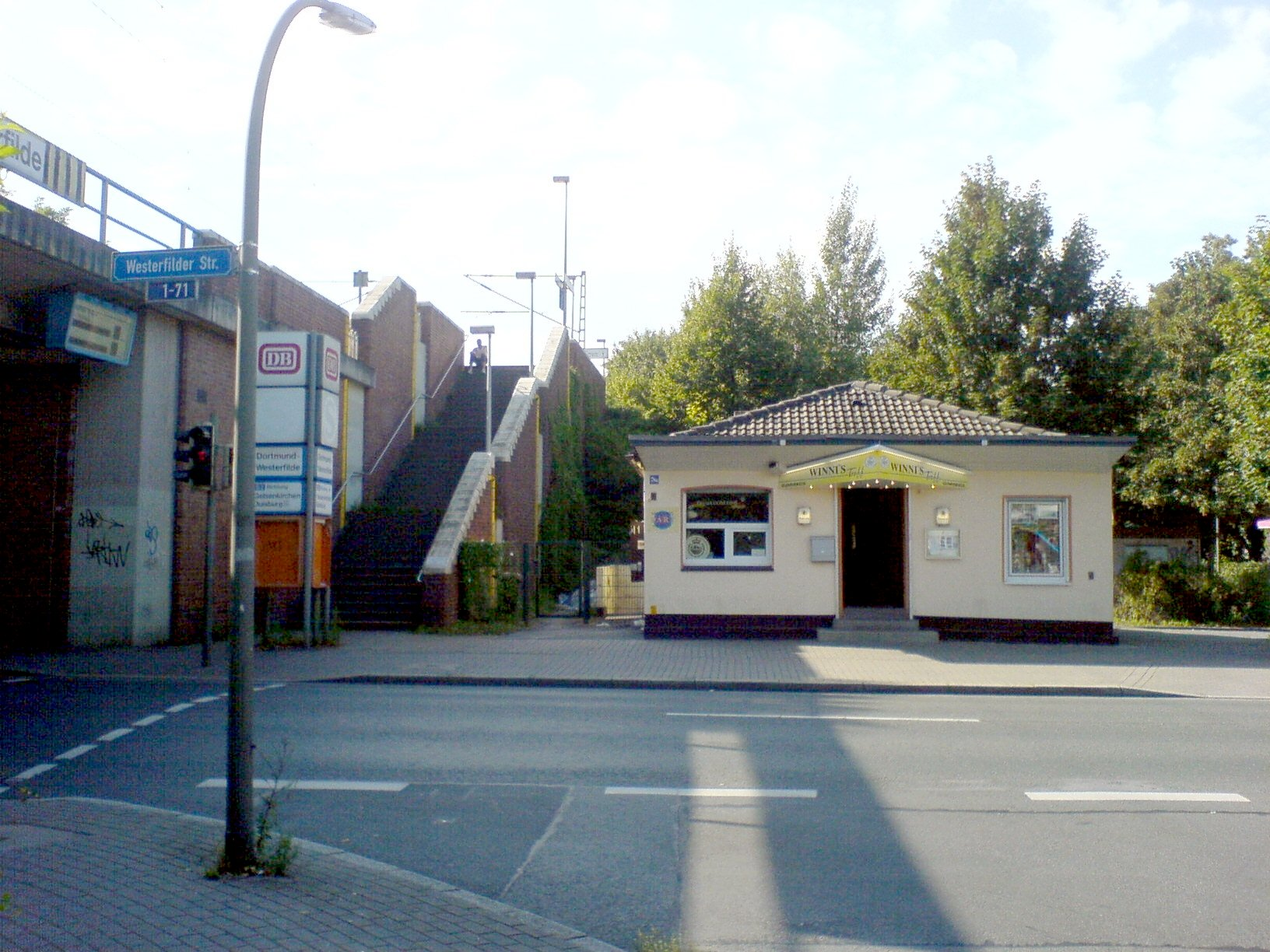 Bahnhof Dortmund-Westerfilde